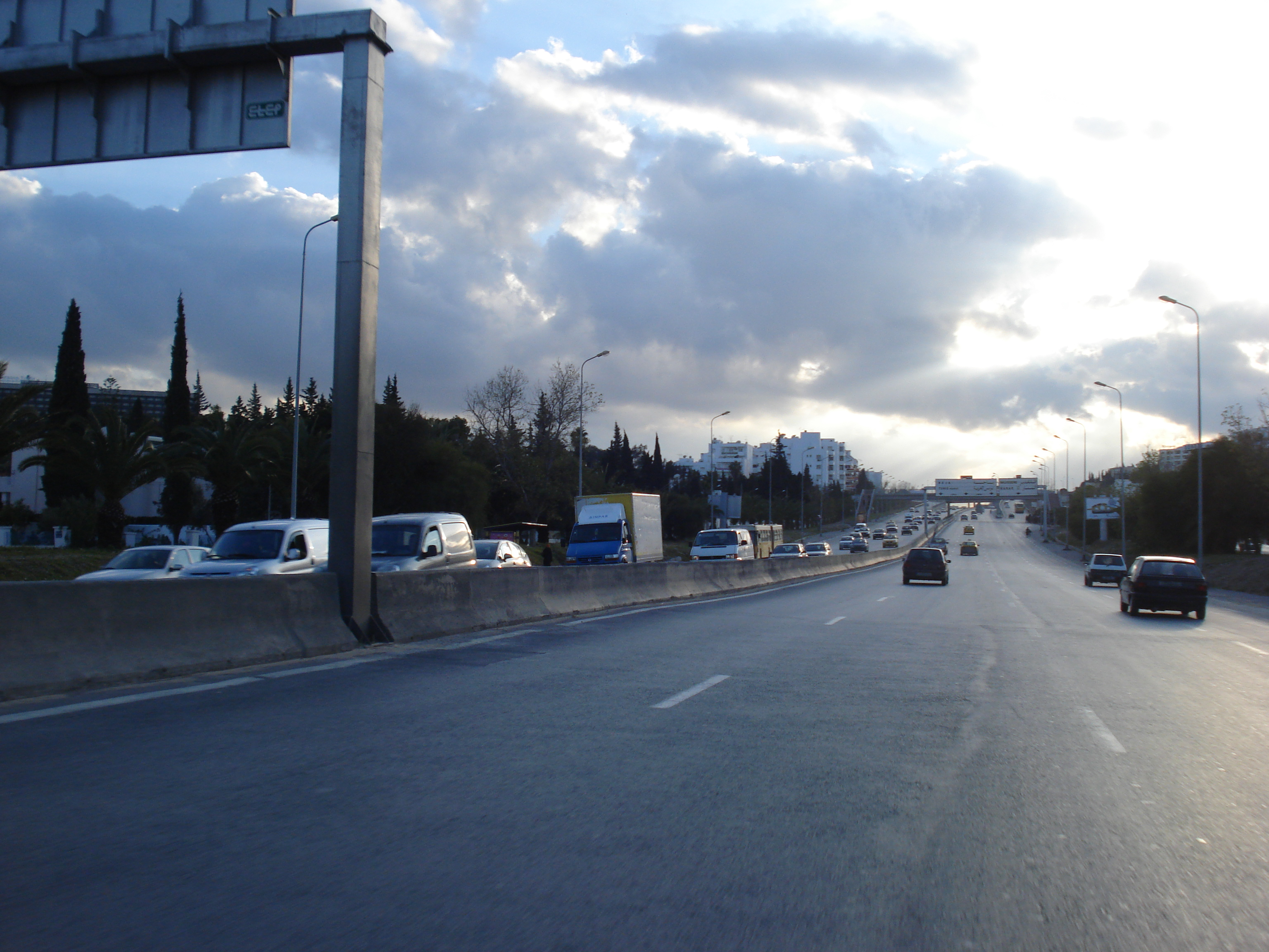 Boulevard du 7-Novembre 1987, rebaptisé du nom de Mohamed Bouazizi, à Tunis (Tunisie)